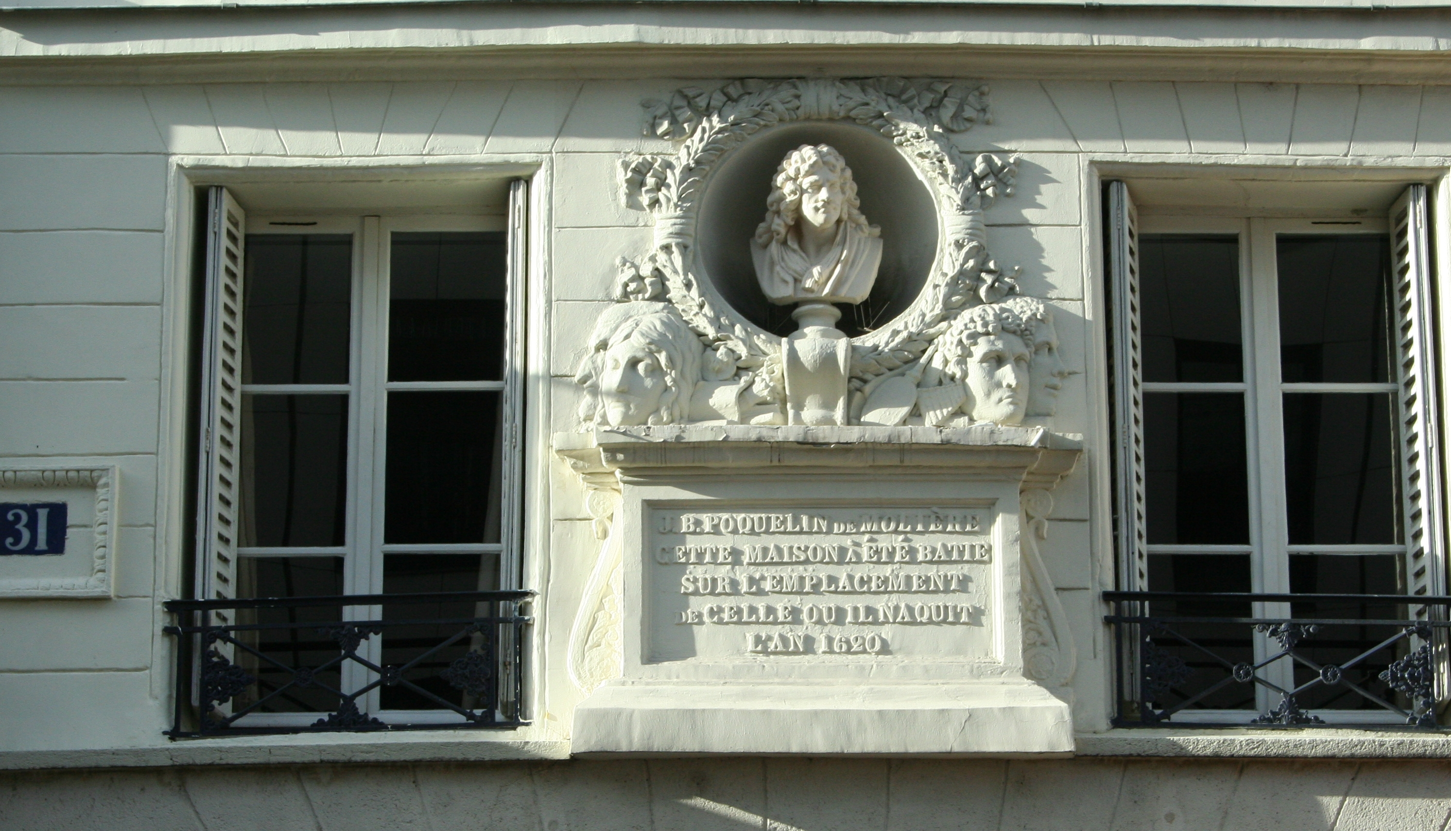 Facade du 31 rue du Pont-Neuf à Paris portant un buste de Molière .